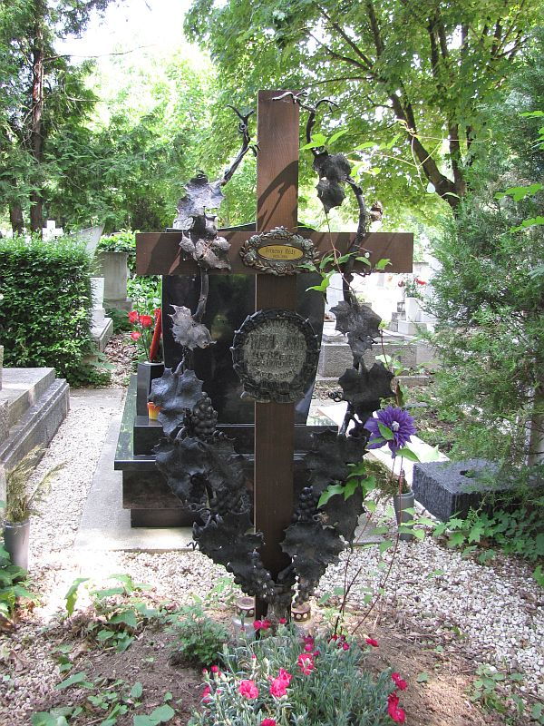 Temessy Hédi, Temesi Hedvig (1925. május 6. Budapest - 2001. május 29. Budapest) színésznő sírja Budapesten. Farkasréti temető: 11/1-1-86.